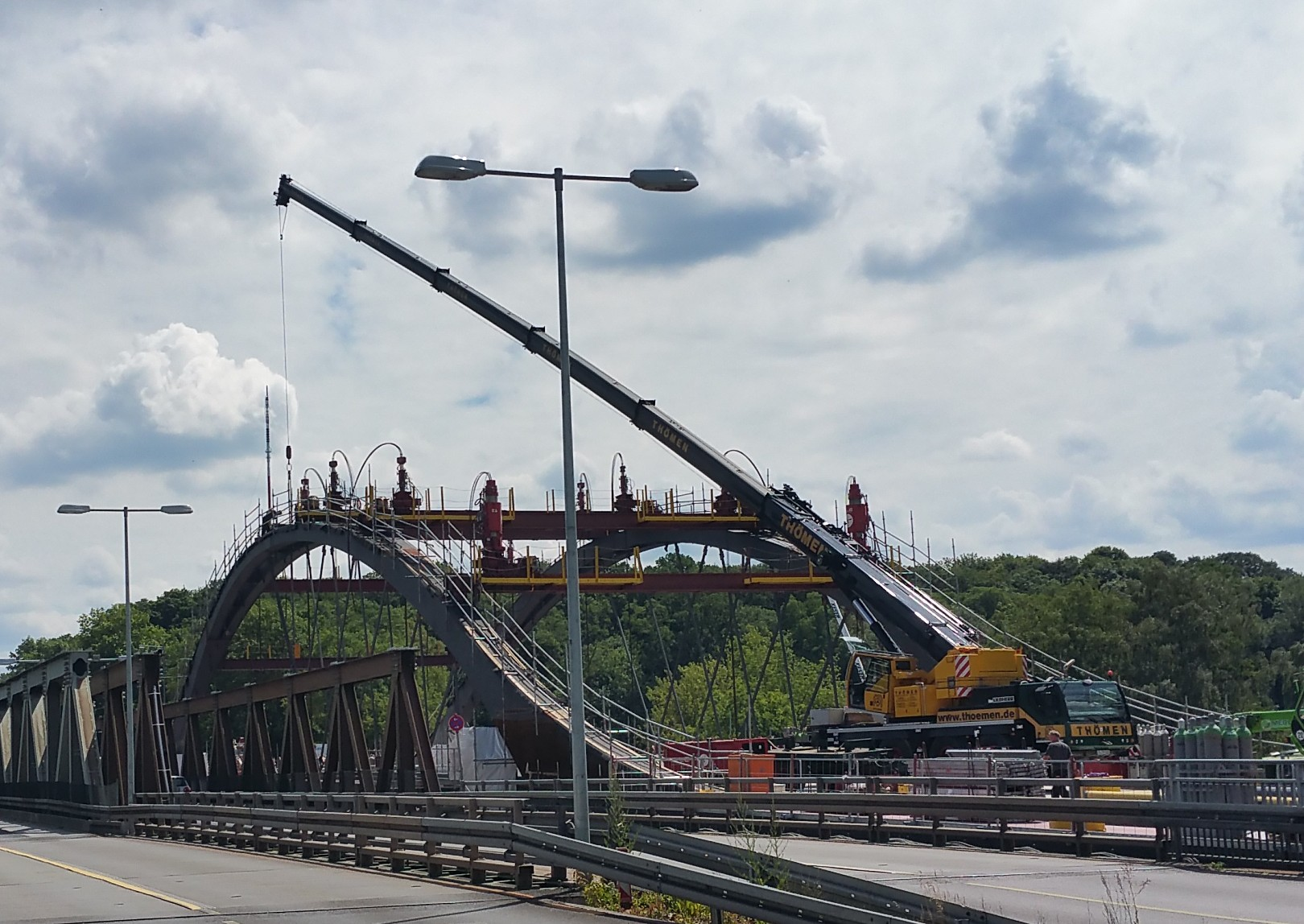 Neue Freybrücke Baustelle 22-06-16 Einbau der Streben